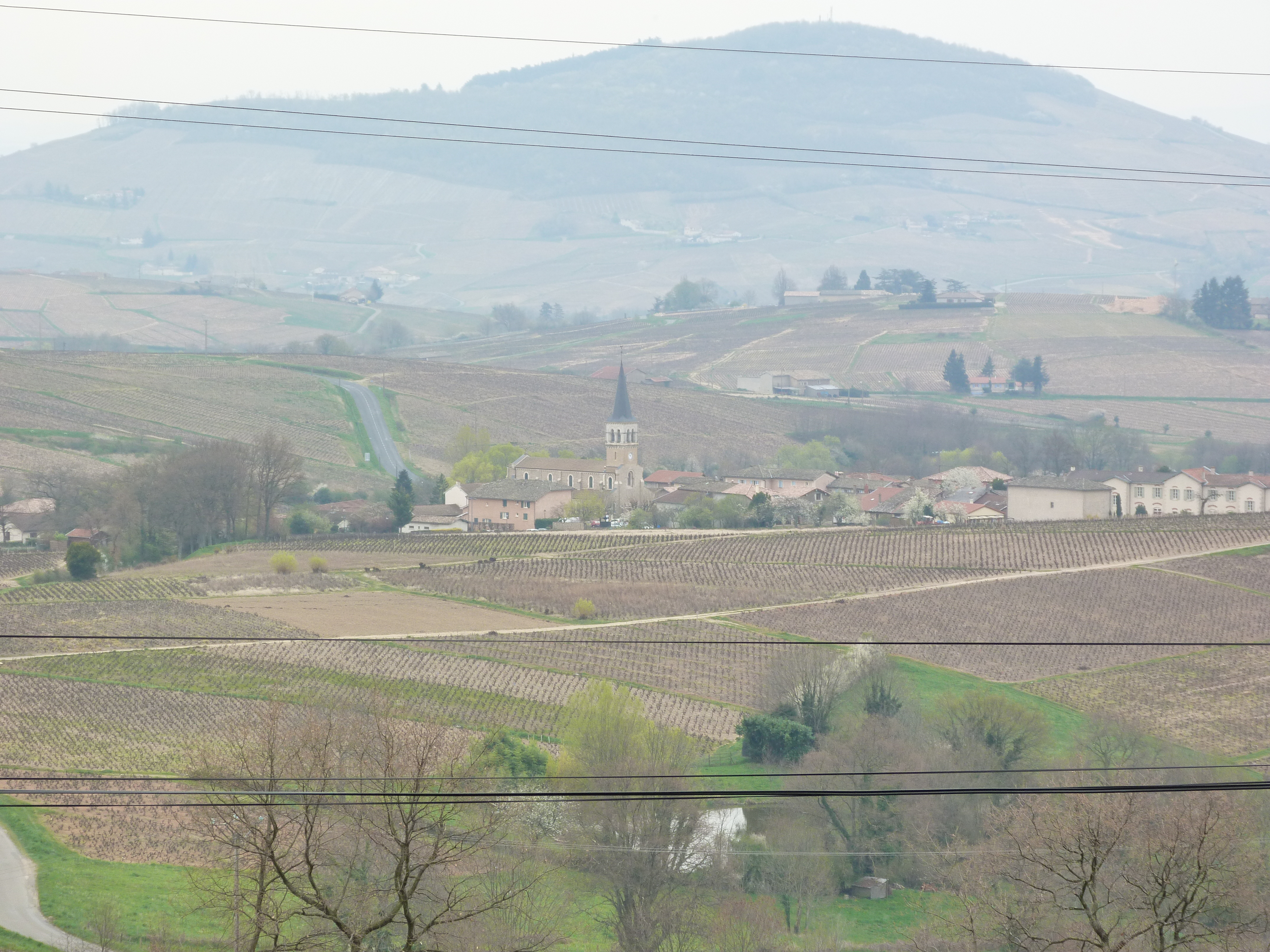 Vue du bourg de la route de Saint-Joseph vers le Clos Dessus